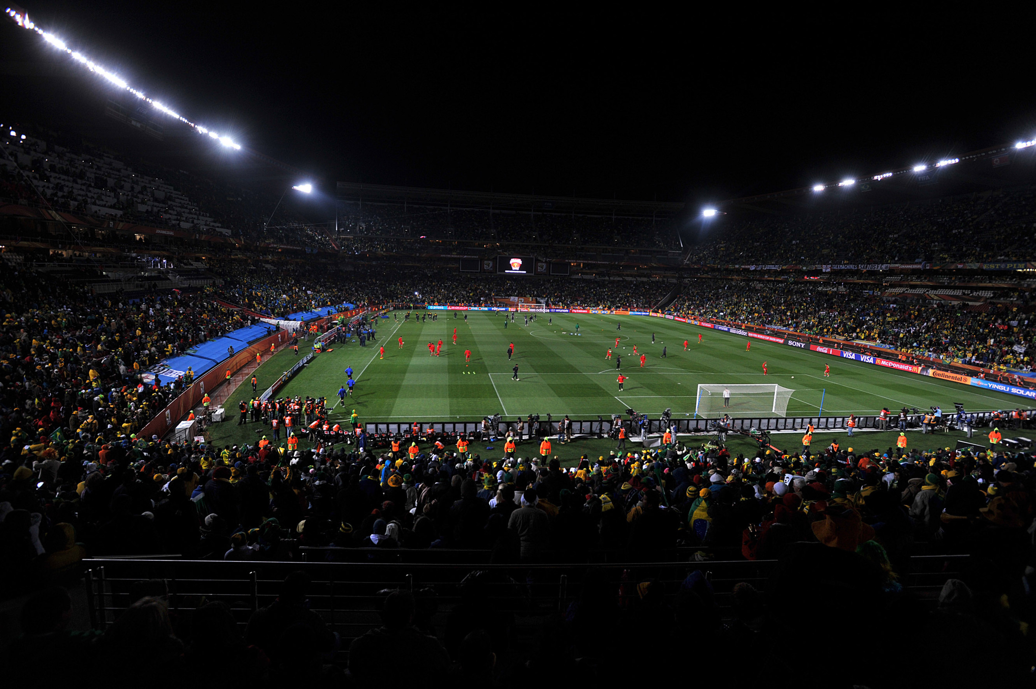 Joanesburgo (África do Sul) - Observadores brasileiros na copa do mundo criticam segurança e transporte na África do Sul, os estádios são destaques positivos.